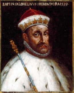 Dipinto del doge Battista Lomellini